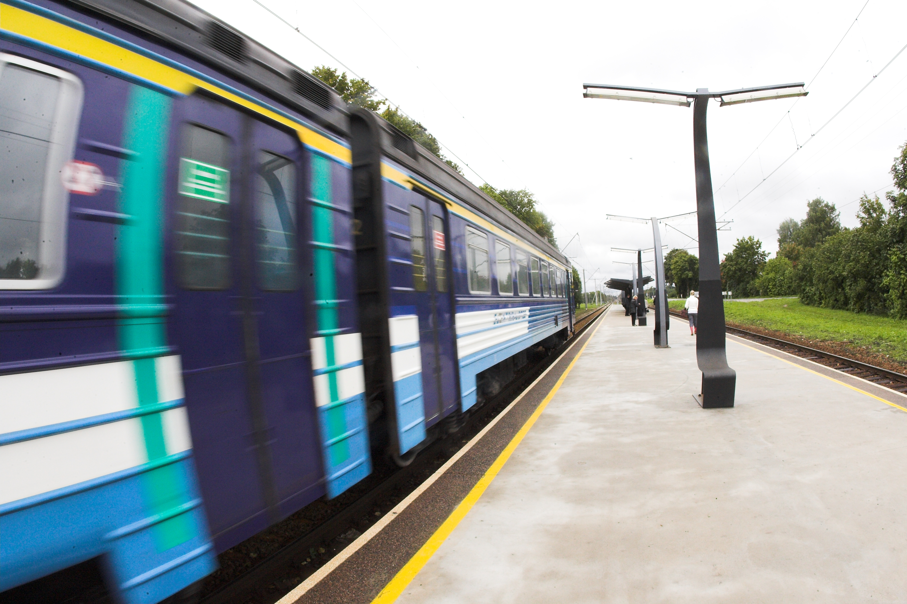 Saue uus raudteejaam